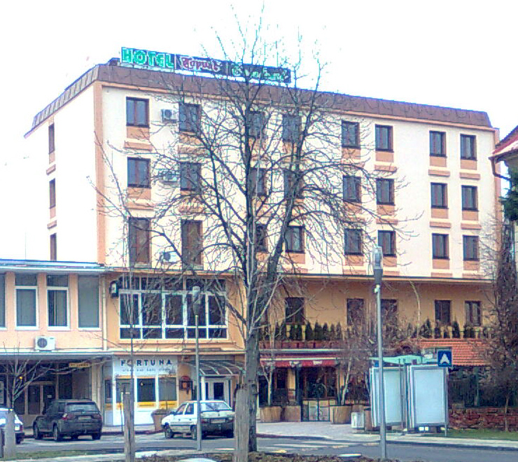 Šaľa Hotel central